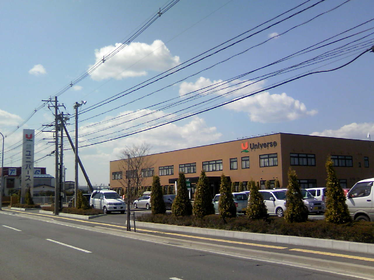 ユニバース (スーパーマーケット) (Supermarket Universe HONBU - Hachinohe, Aomori, JAPAN)